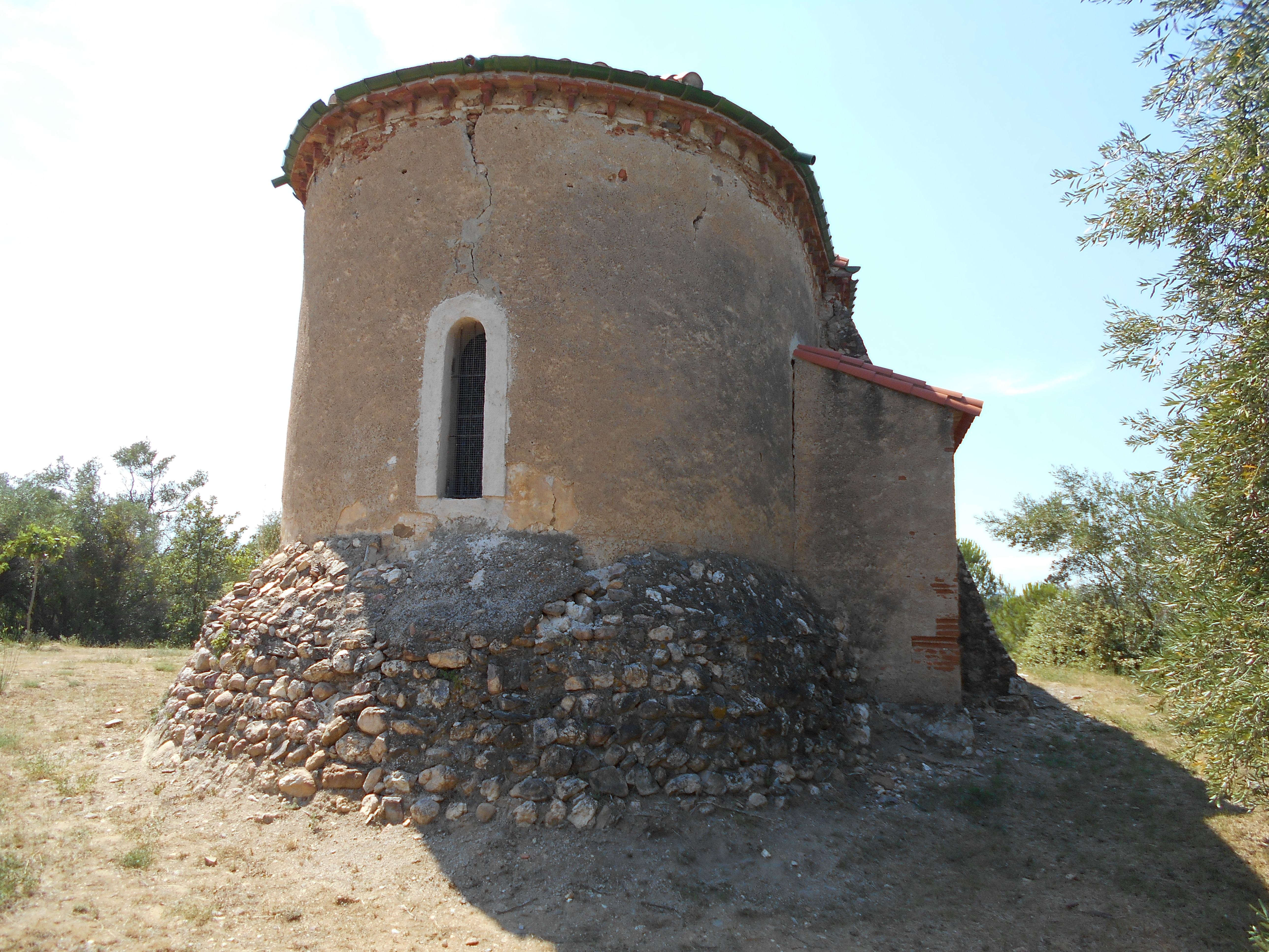 Absis, amb les restes de l'església preromànica